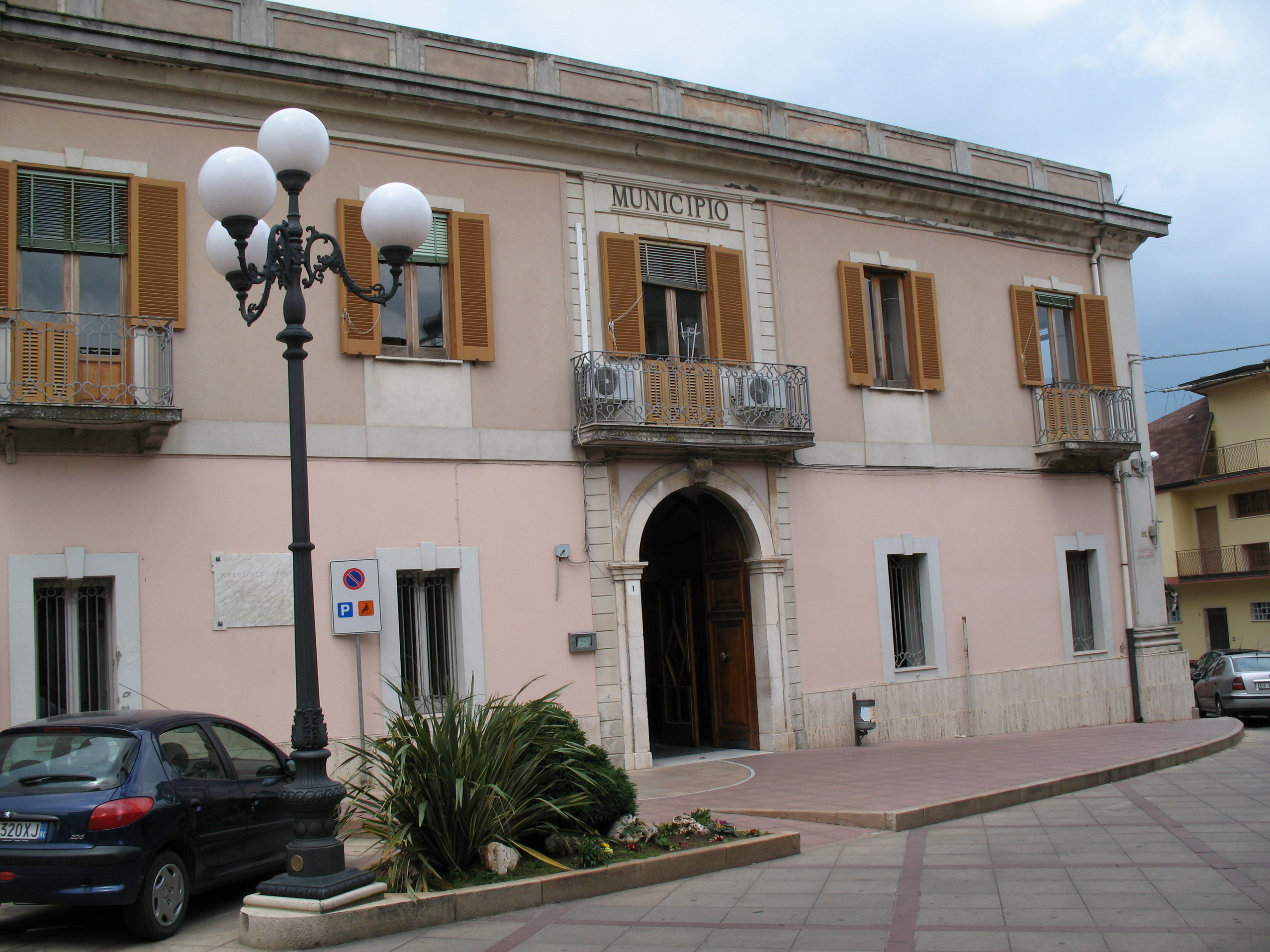 Municipio - Cittanova (RC)